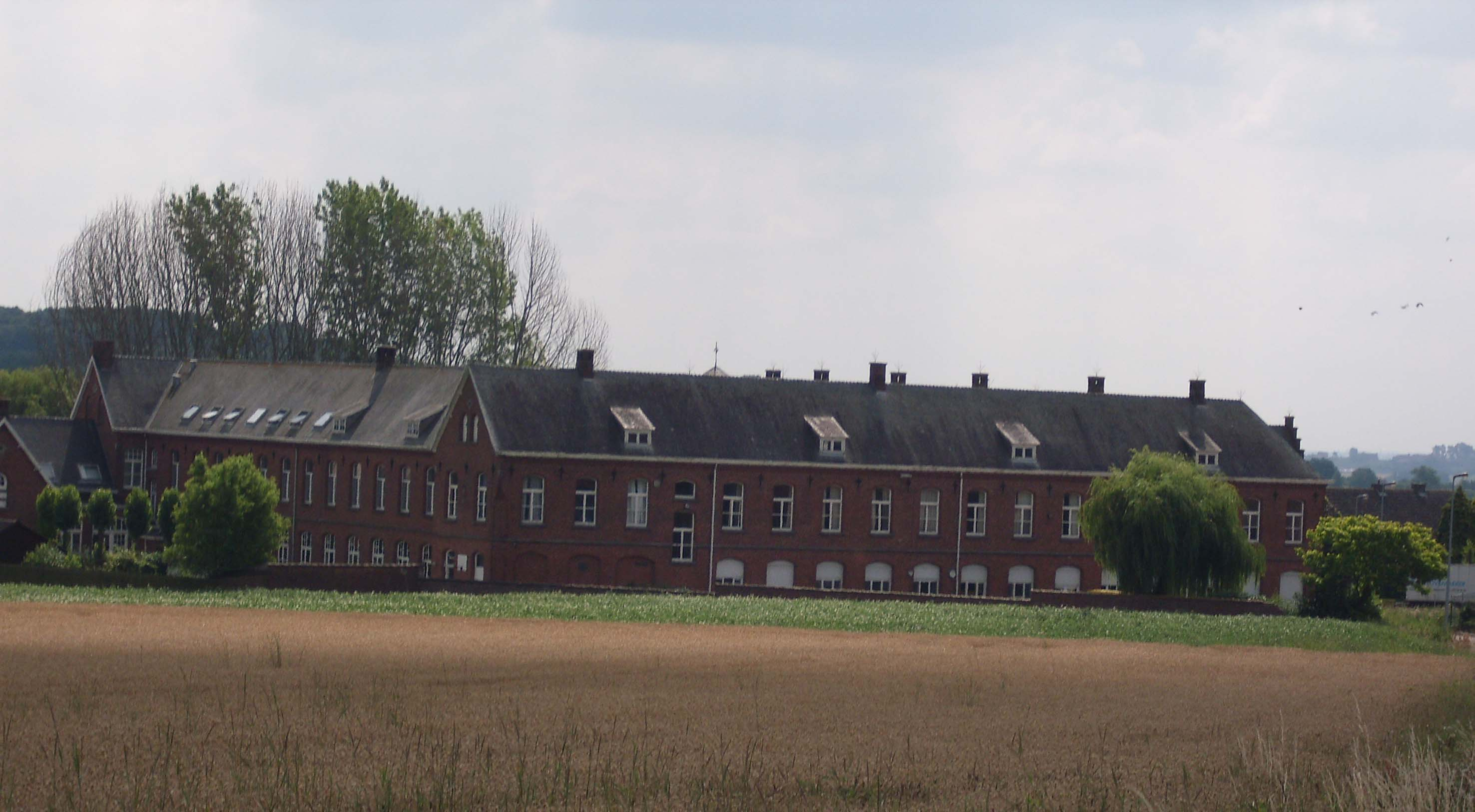 Huize Godtschalck - Godtschalckstraat - Loker - Heuvelland - West-Vlaanderen - Vlaanderen - België